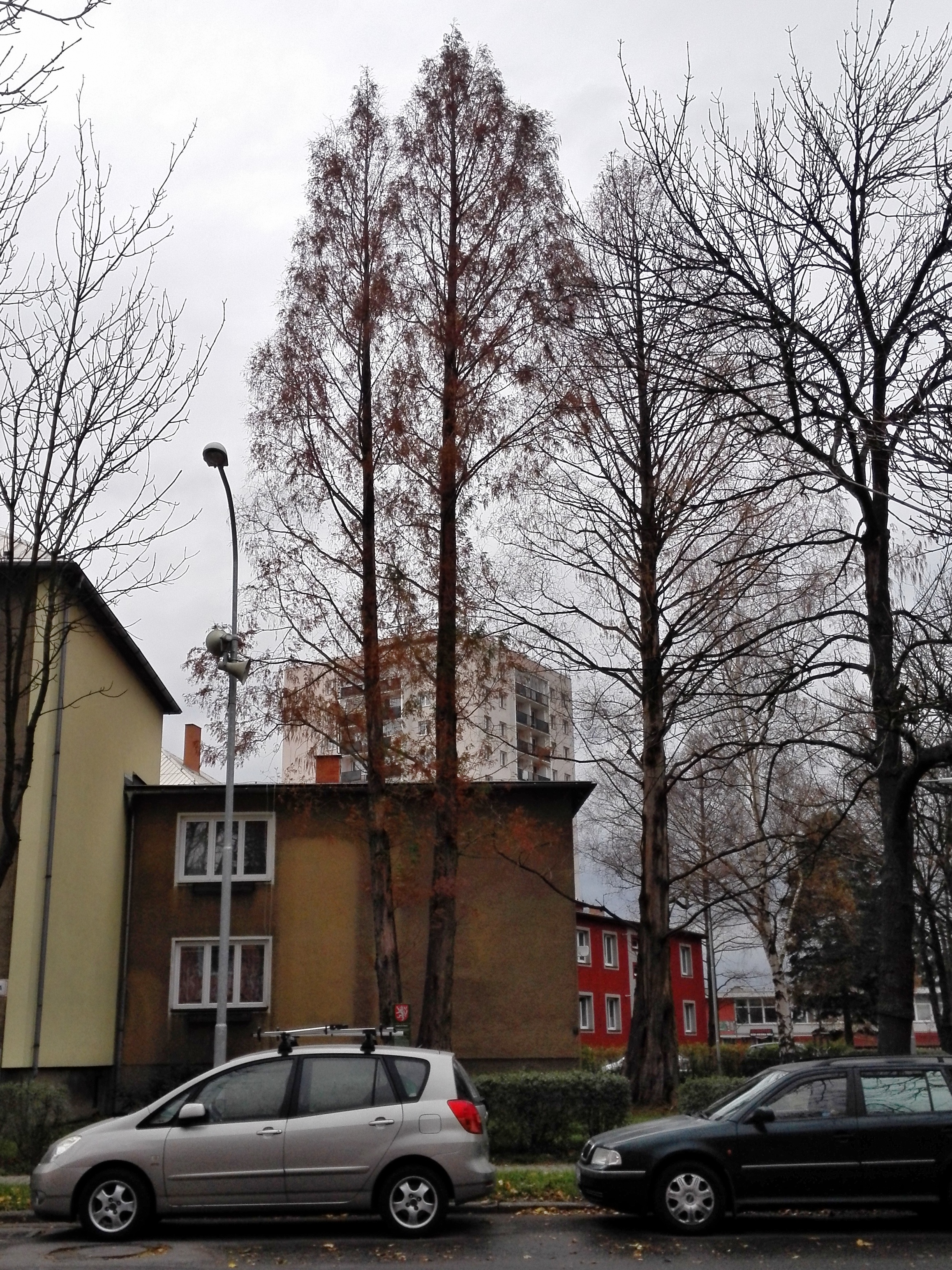 Novojičínské metasekvoje